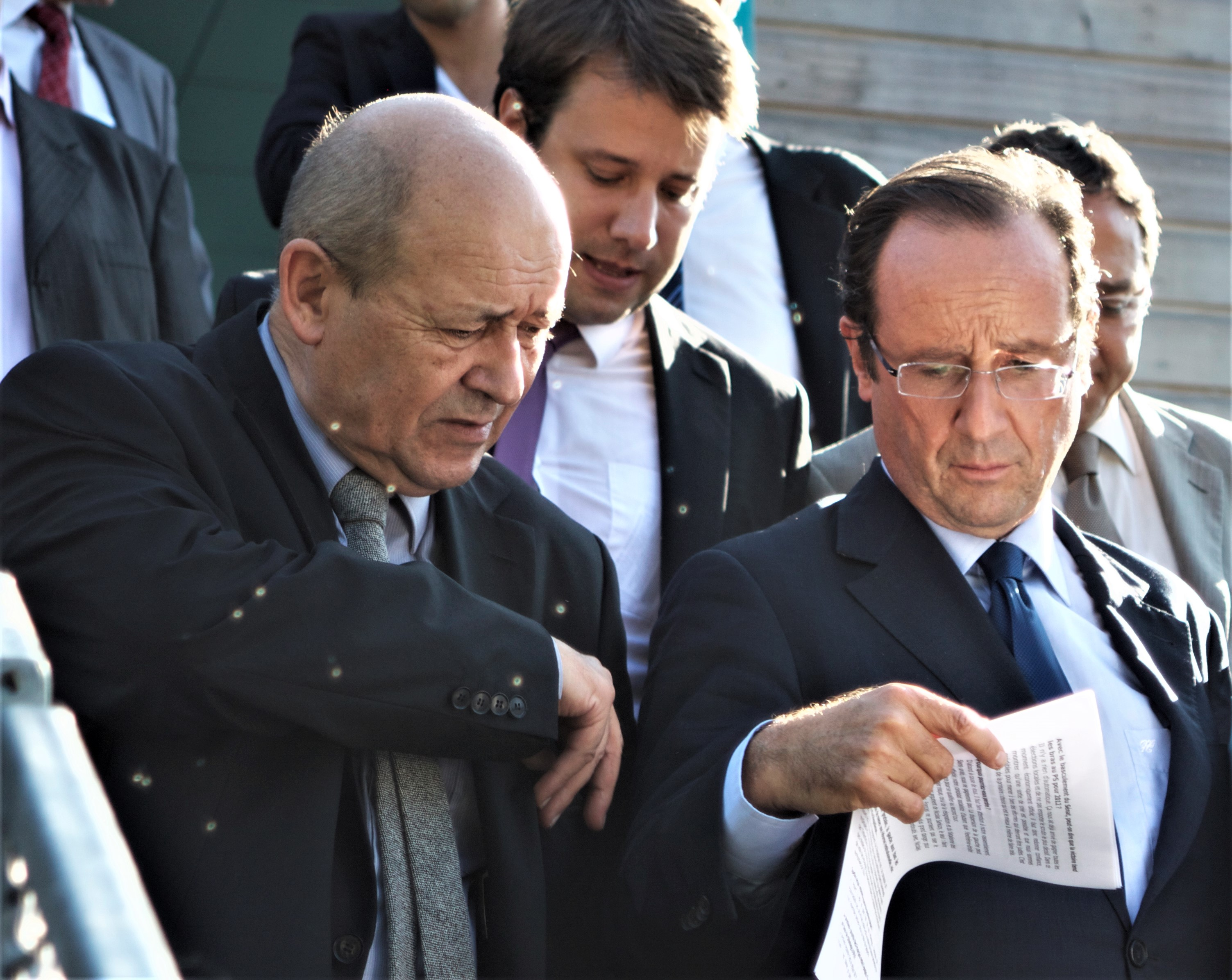 Venue François Hollande à Rennes le 27 septembre 2011, Jean-Yves Le Drian, Loïg Chesnais-Girard